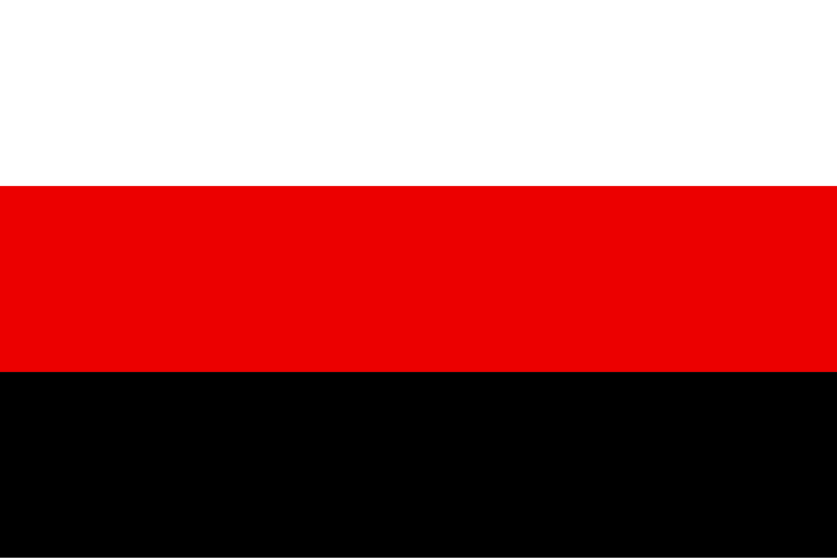 Drapeau de l'Alliance pour le salut au Sahel (ASS)